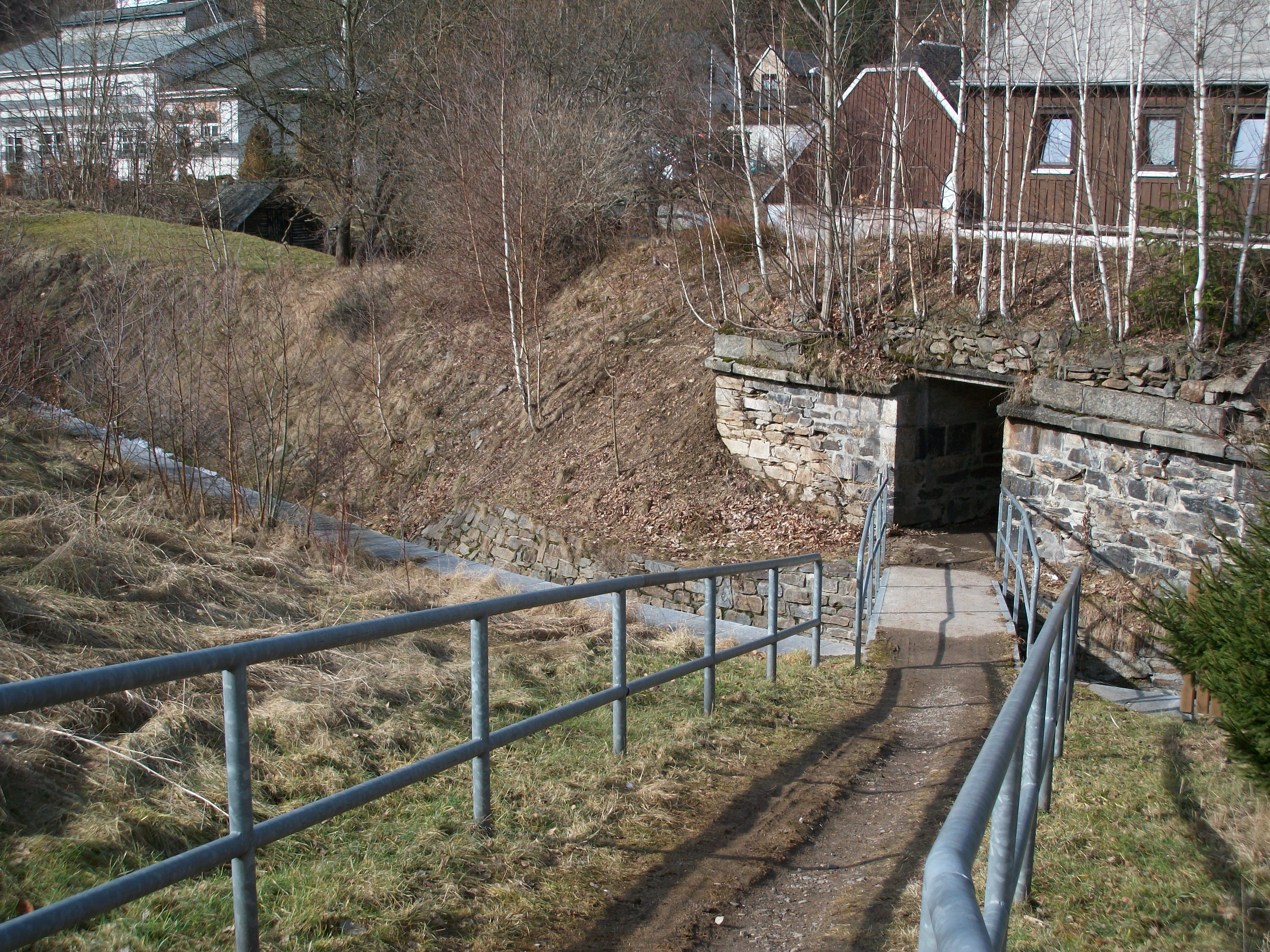 Bahndamm bei Brandmühle1